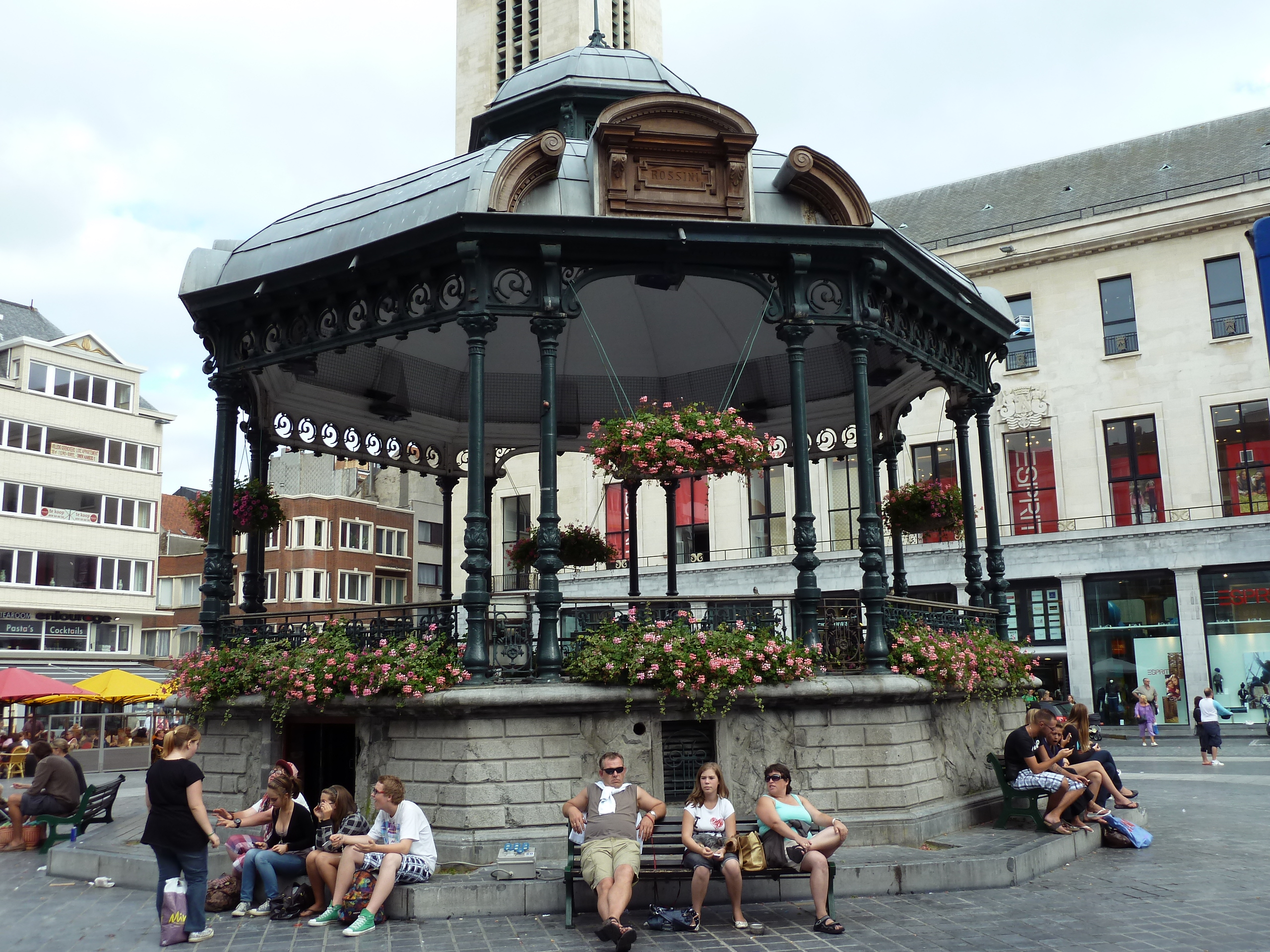 Pavillon auf dem Wapenplein